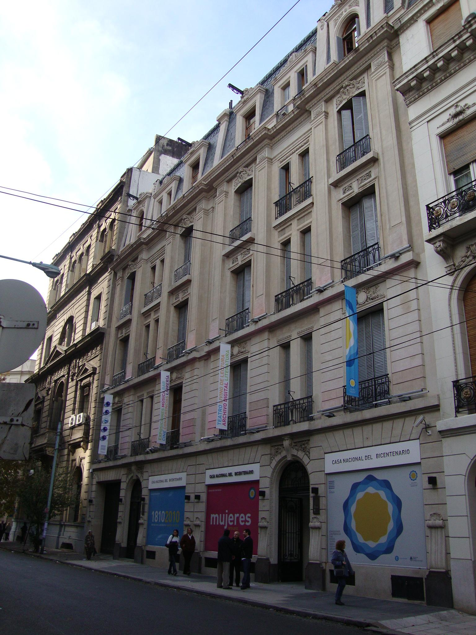 Fachada del edificio transformado en Casa del Bicentenario. Calle Riobamba 985. Buenos Aires, Argentina.